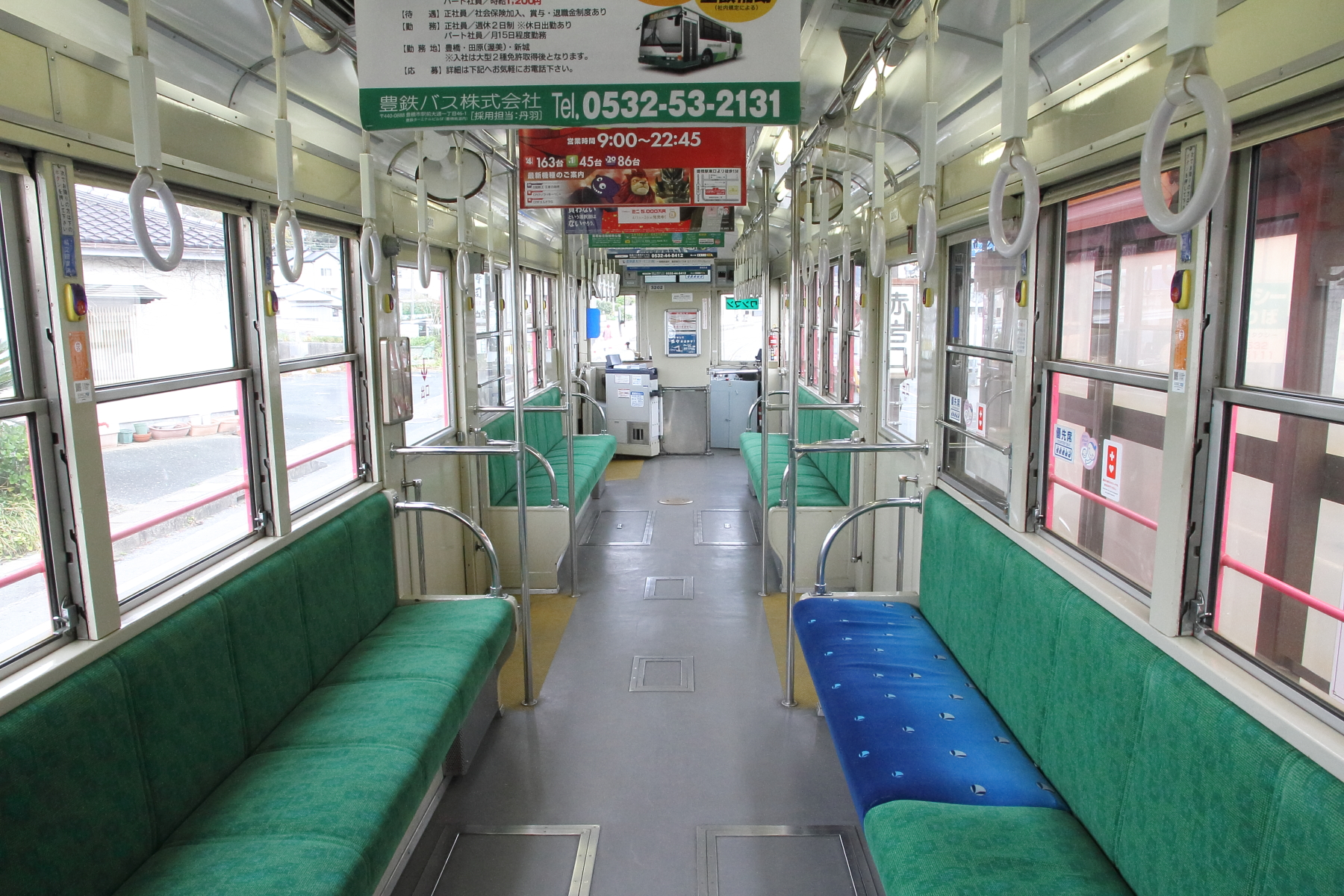 豊橋鉄道モ3200形3202の内装